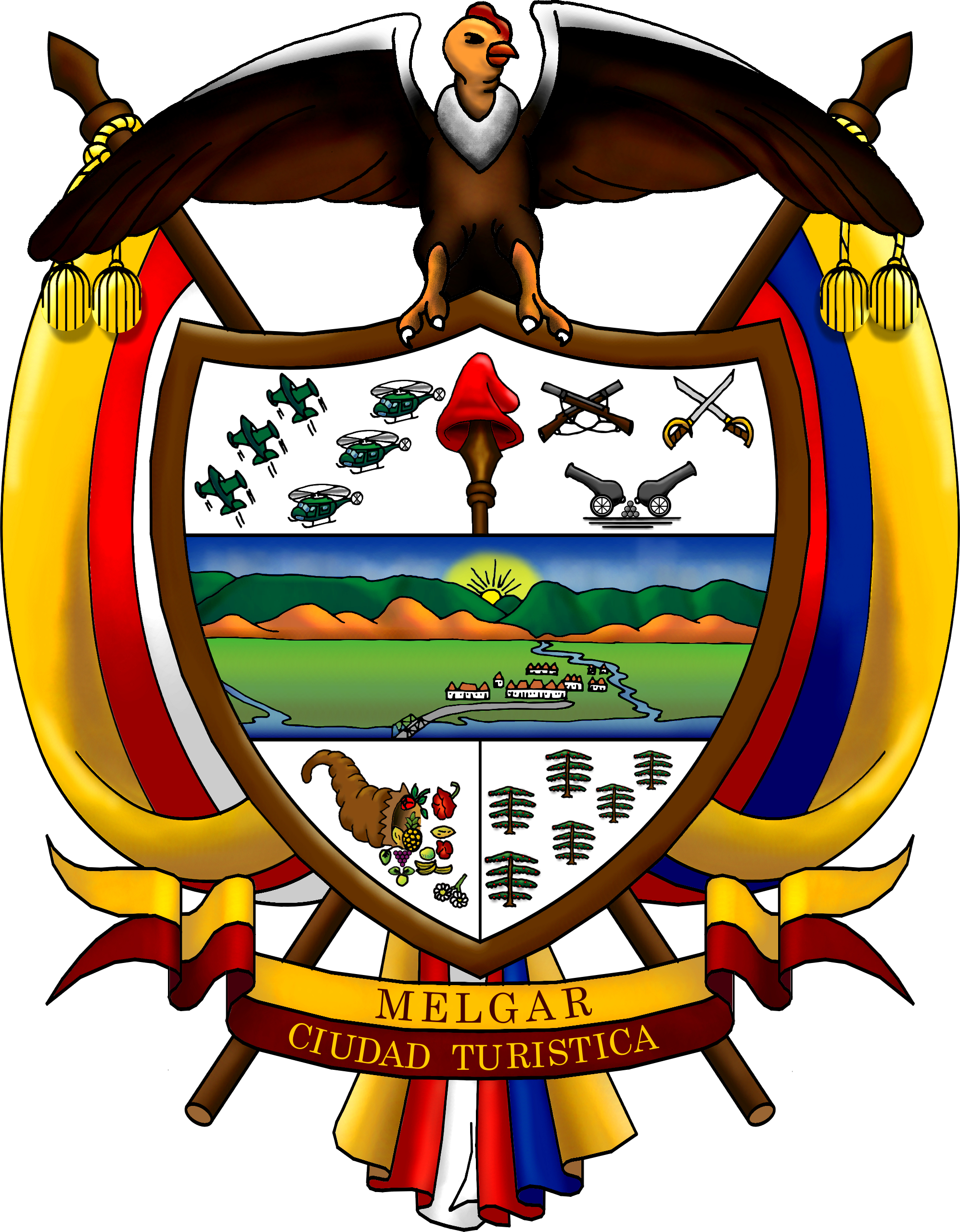 Escudo del Municipio de Melgar